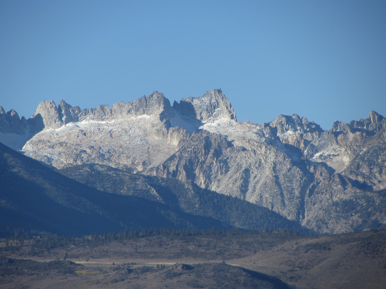 Looking West_1